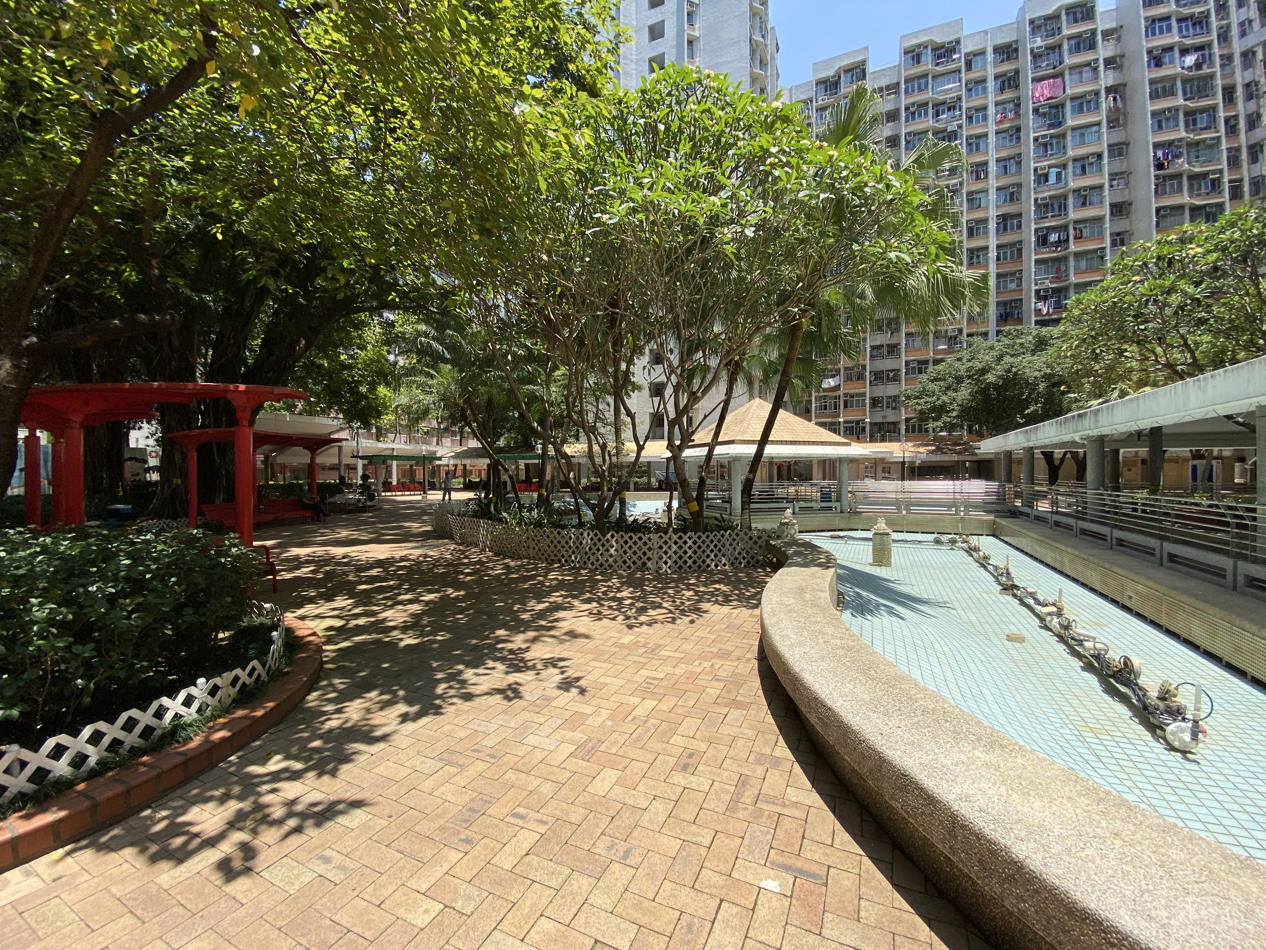 Lai On Estate